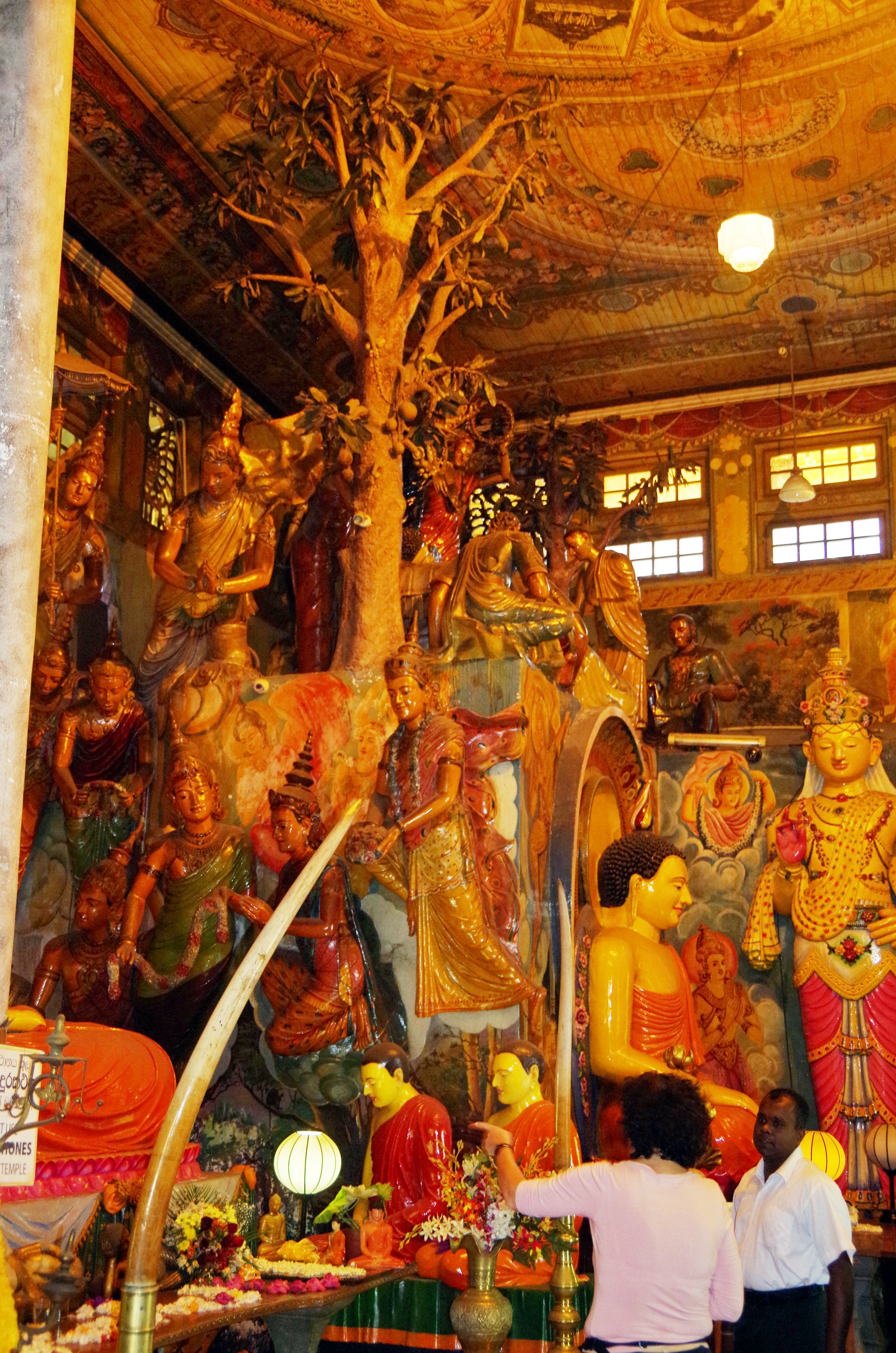 Gangaramaya Temple